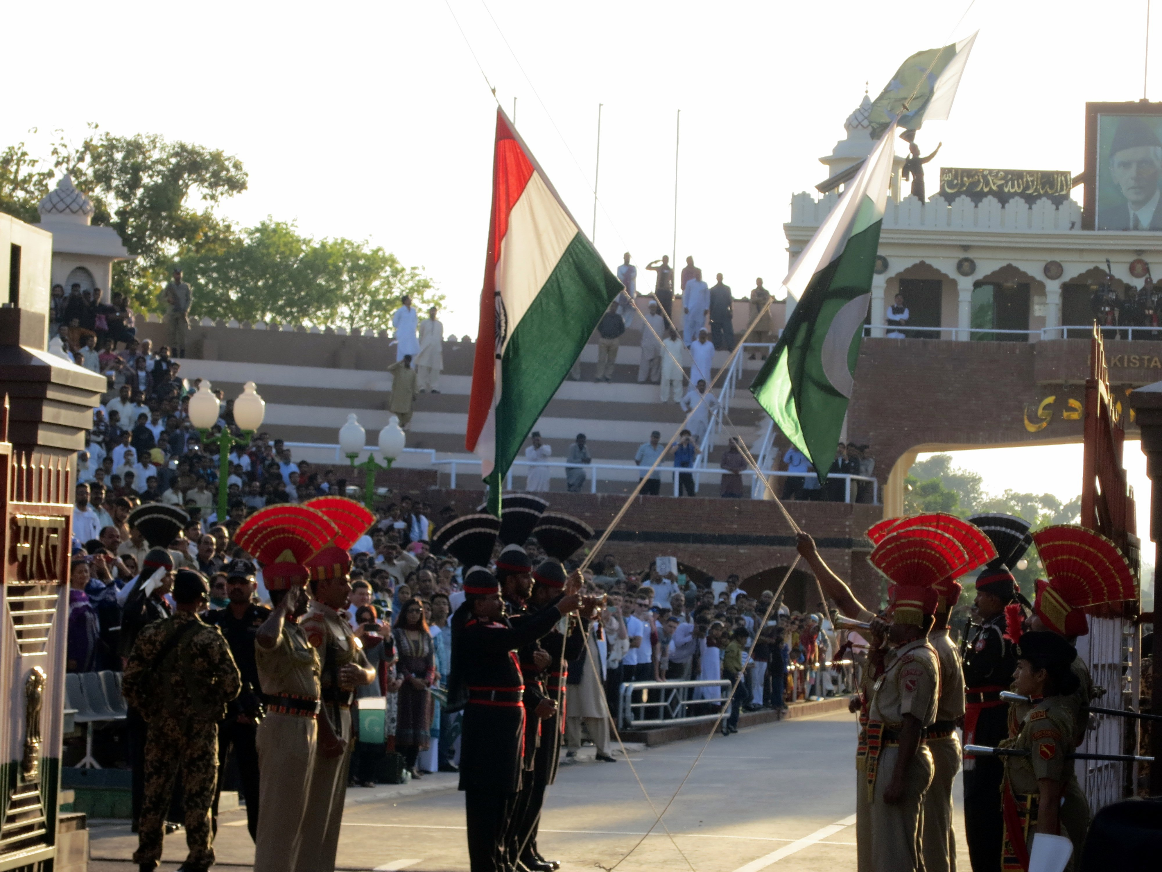 טקס סגירת הגבול בין הודו לפקיסטן - 2014 מקור